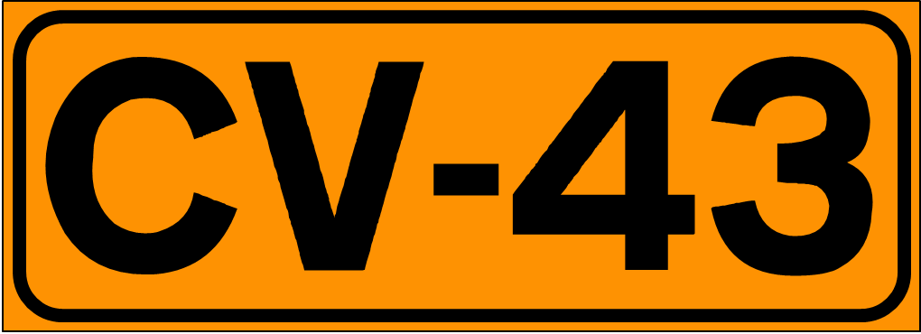 Inidcador de la Carretera de la Comunidad Valenciana CV-43